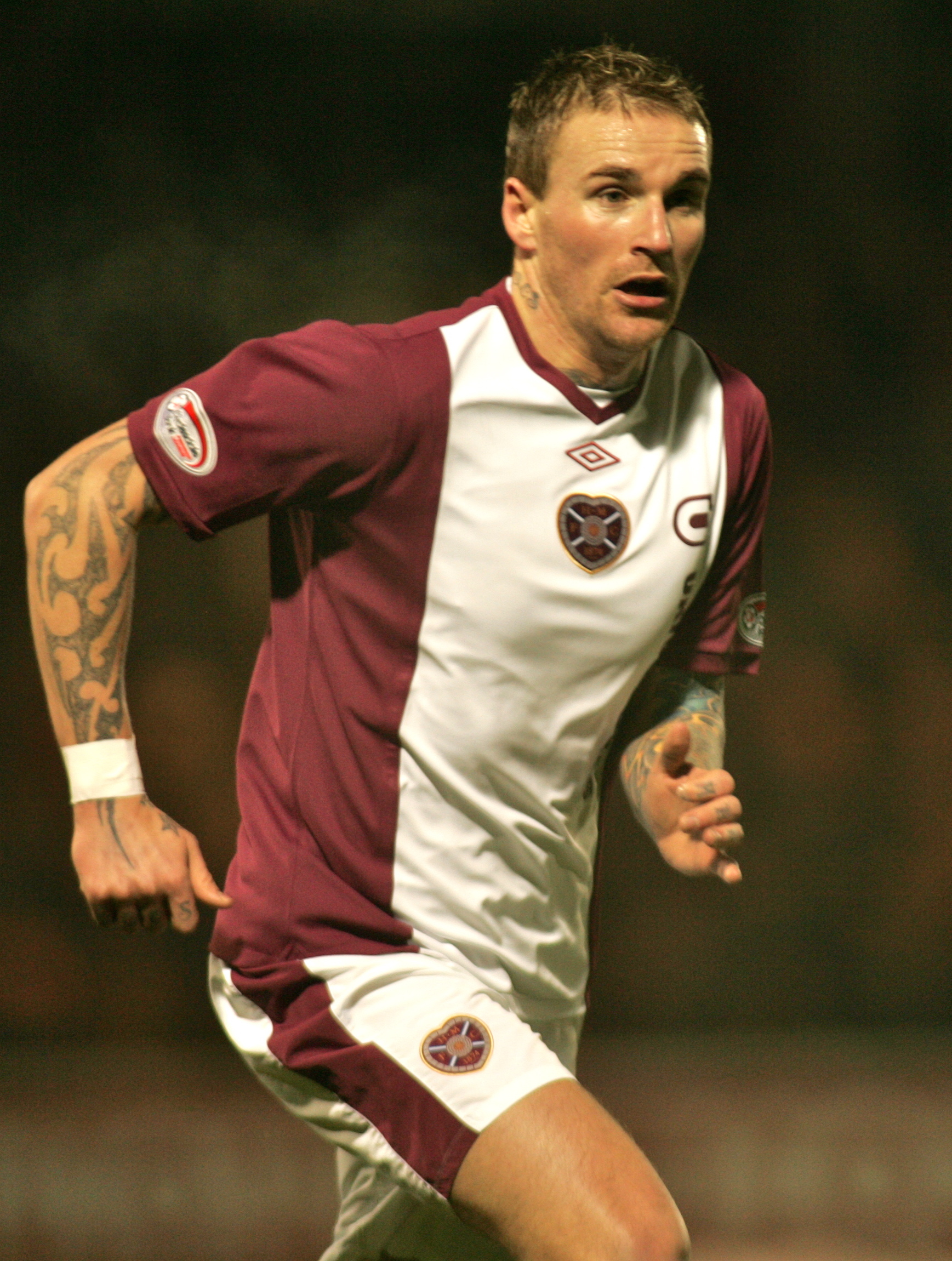 St Mirren vs Hearts